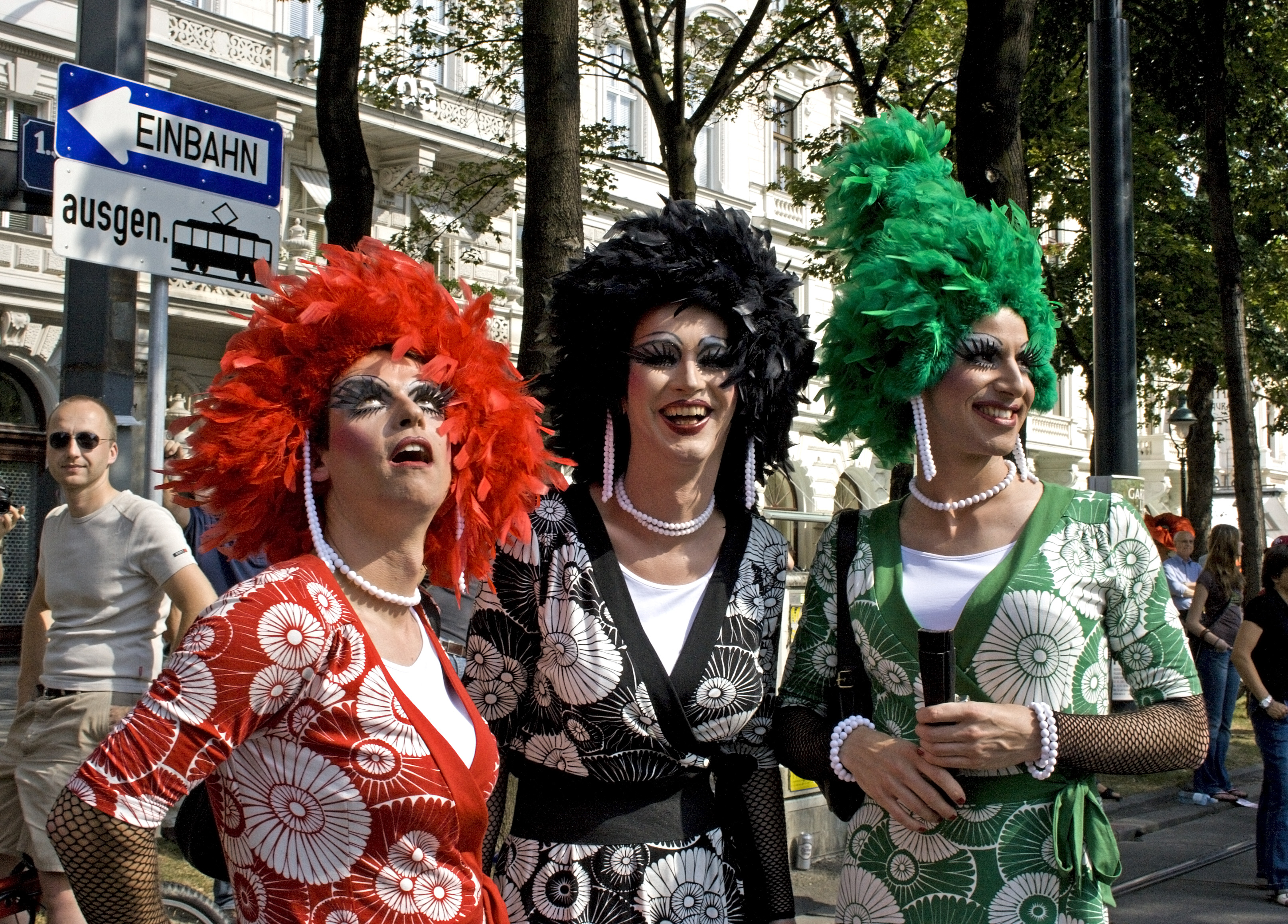 Regenbogenparade 2007, Vienna, Pure Glam